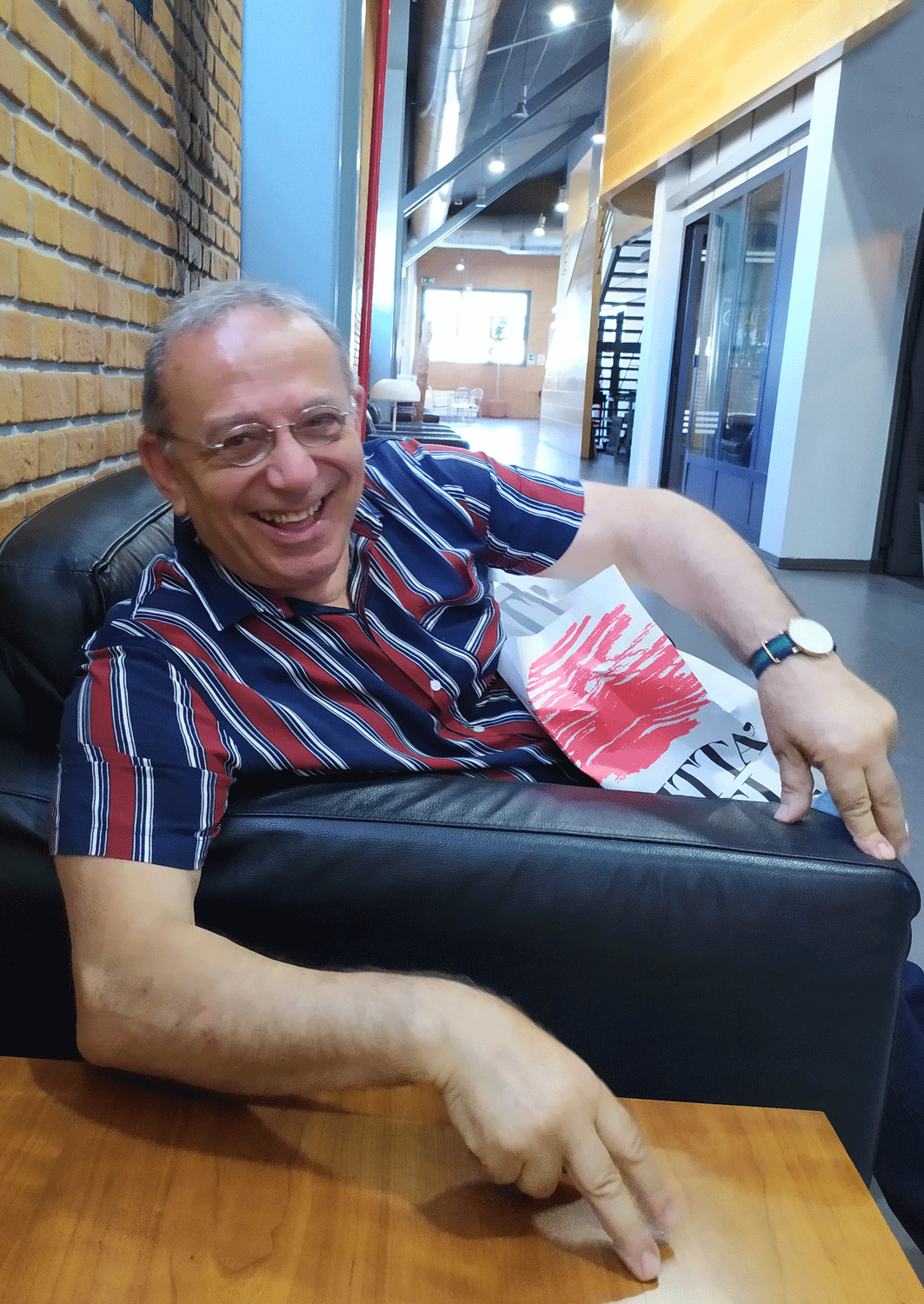 Ottavio Rosati all'Istituto Luce di Roma, Luglio 2020.